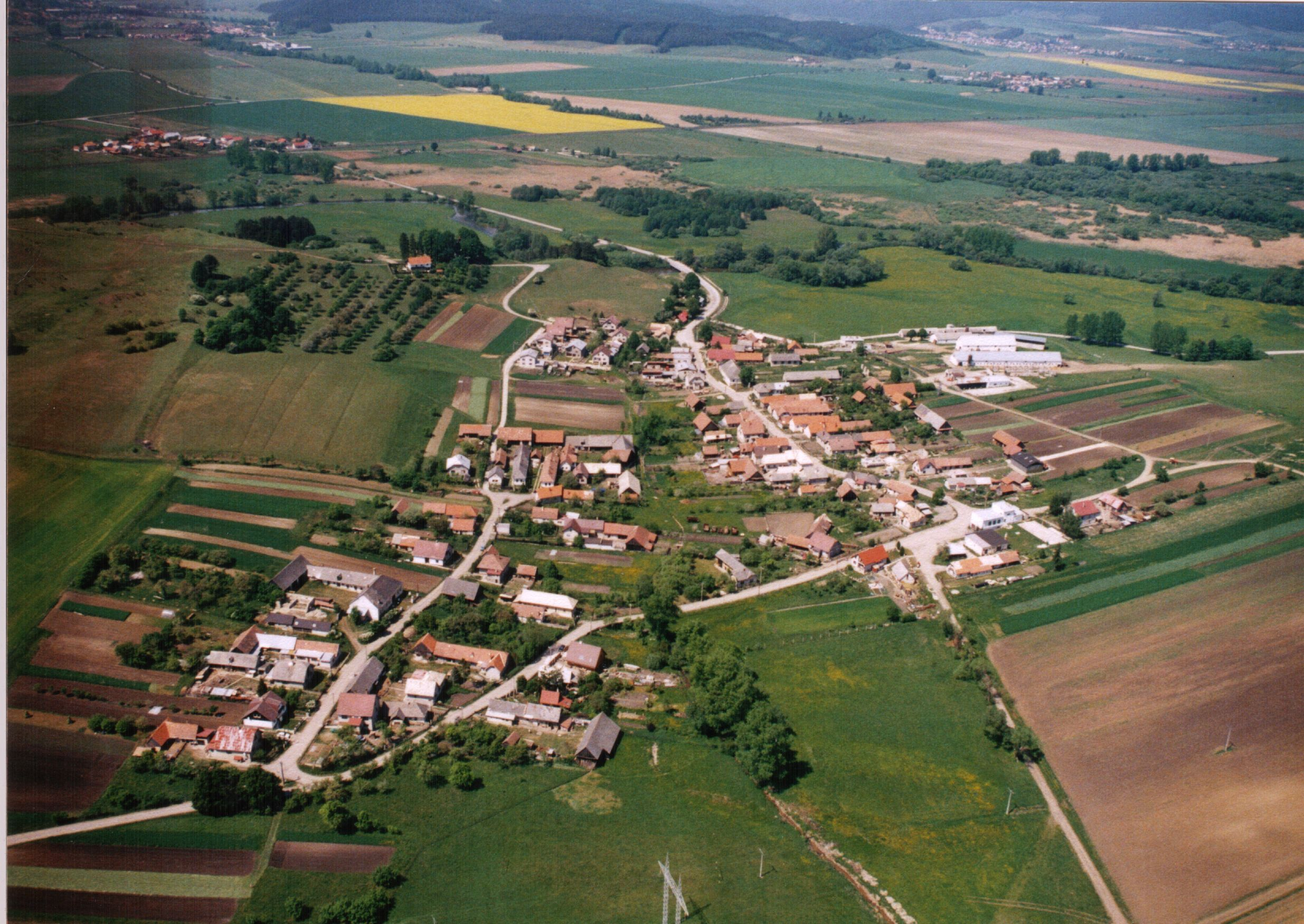 Letecký pohľad